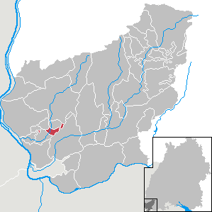 Rümmingen, Landkreis Lörrach, Baden-Württemberg